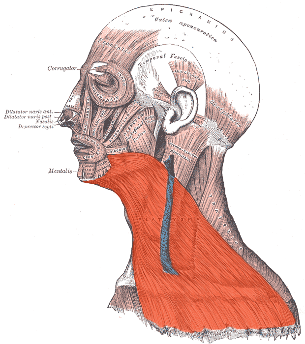 Platysma